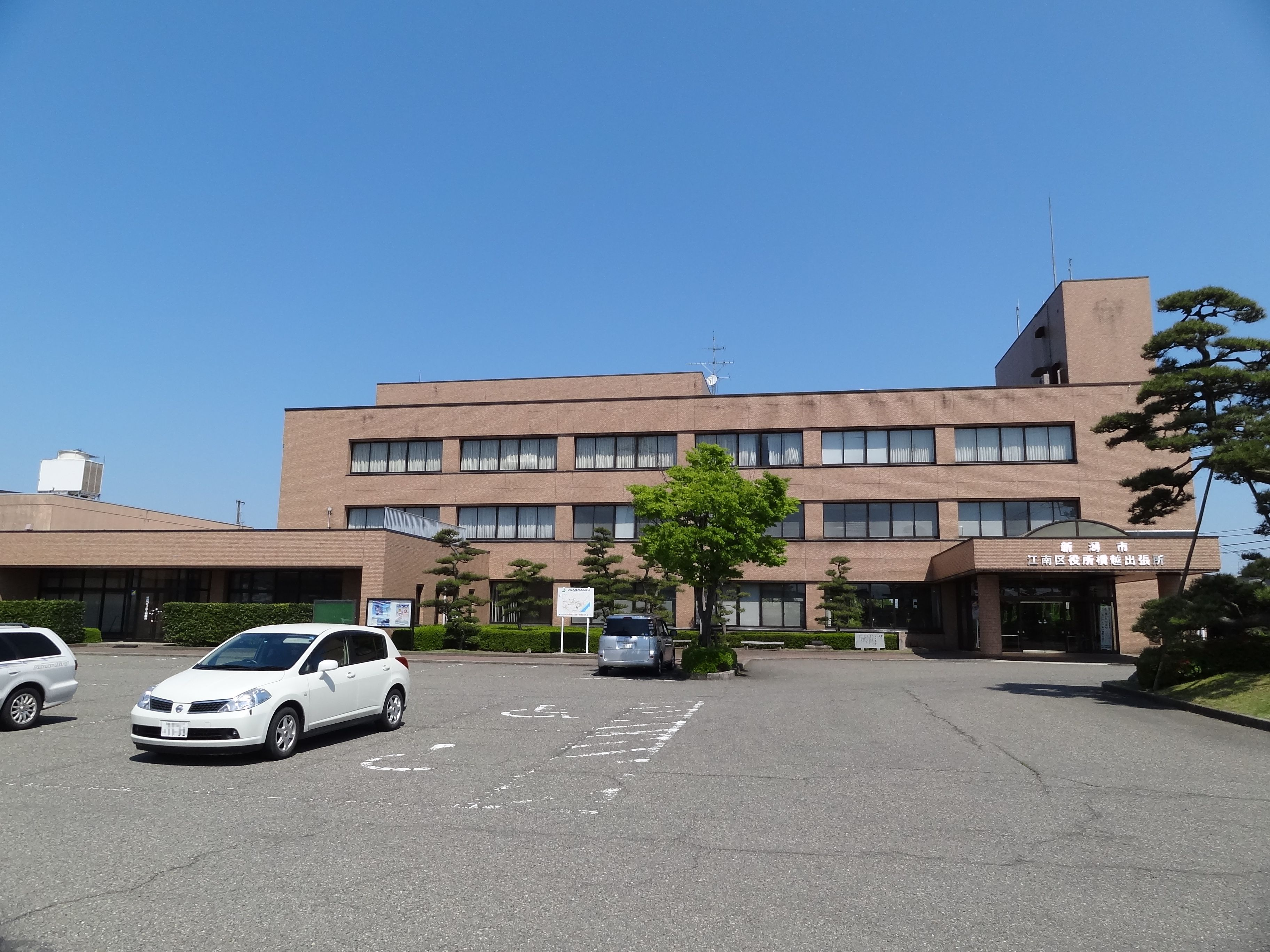 新潟市江南区役所横越出張所